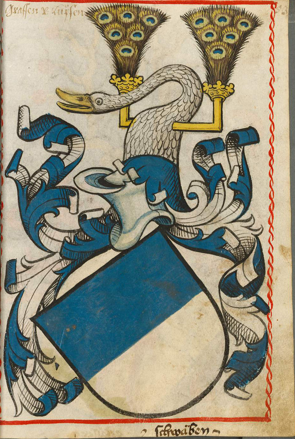 Scheibler'sches Wappenbuch, älterer Teil Lupfen